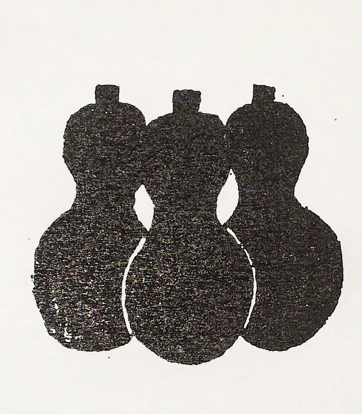 新町遊廓（大阪市）紋章